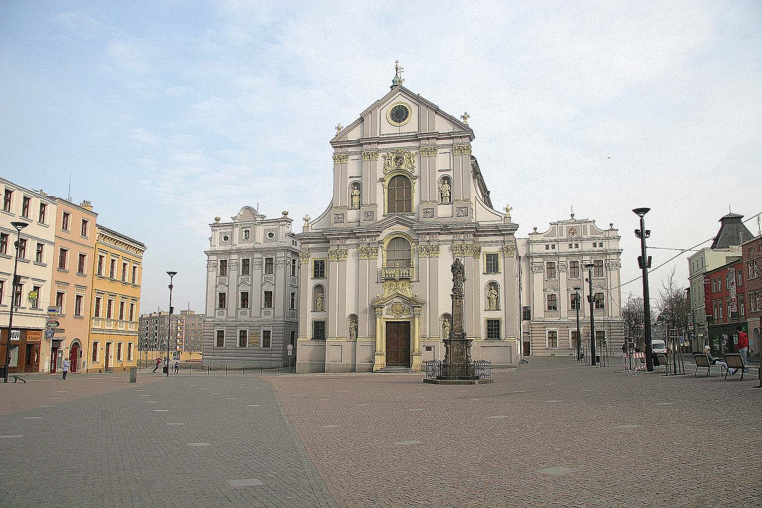 Kostel svatého Vojtěcha v Opavě, district Opava, Czech Republic